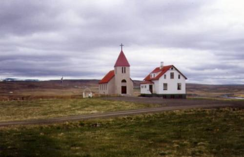 Melstaður in Húnaþing Iceland